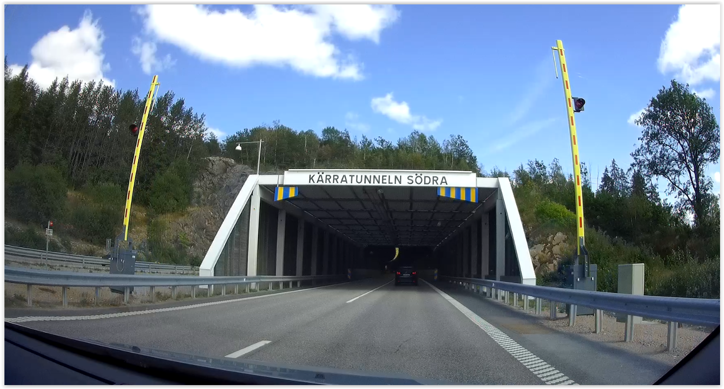 Kärratunneln södra infarten (Uddevalla).